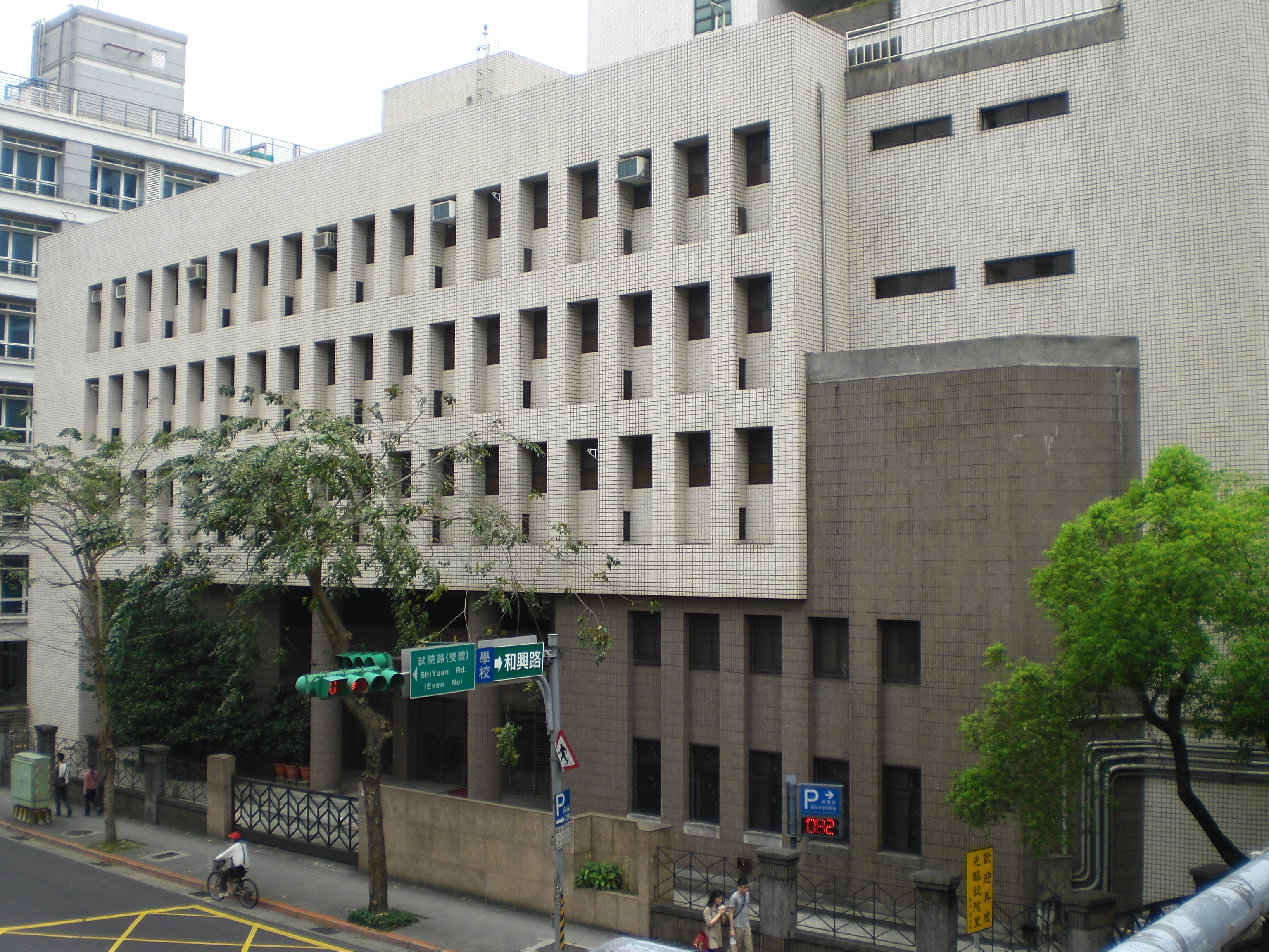 中華民國考選部第二試務大樓，位於臺北市文山區木柵路一段74號，1987年7月15日完工啟用。